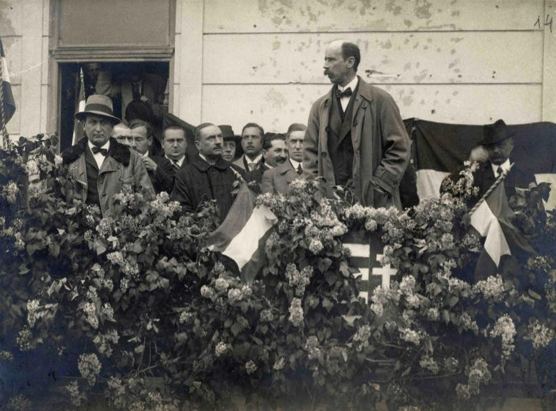 Los políticos húngaros Esteban Bethlen (presidente del Gobierno), Gyula Gömbös (futuro presidente), Endre Bajcsy-Zsilinszky János Zsirkay e István Nagyatádi Szabó en mayo de 1922.